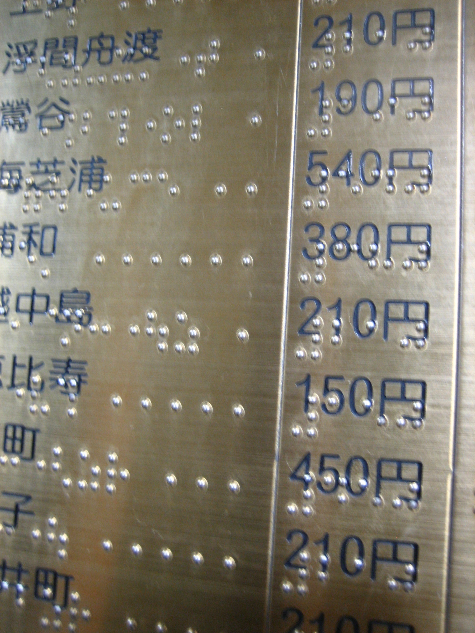 Braille Fares